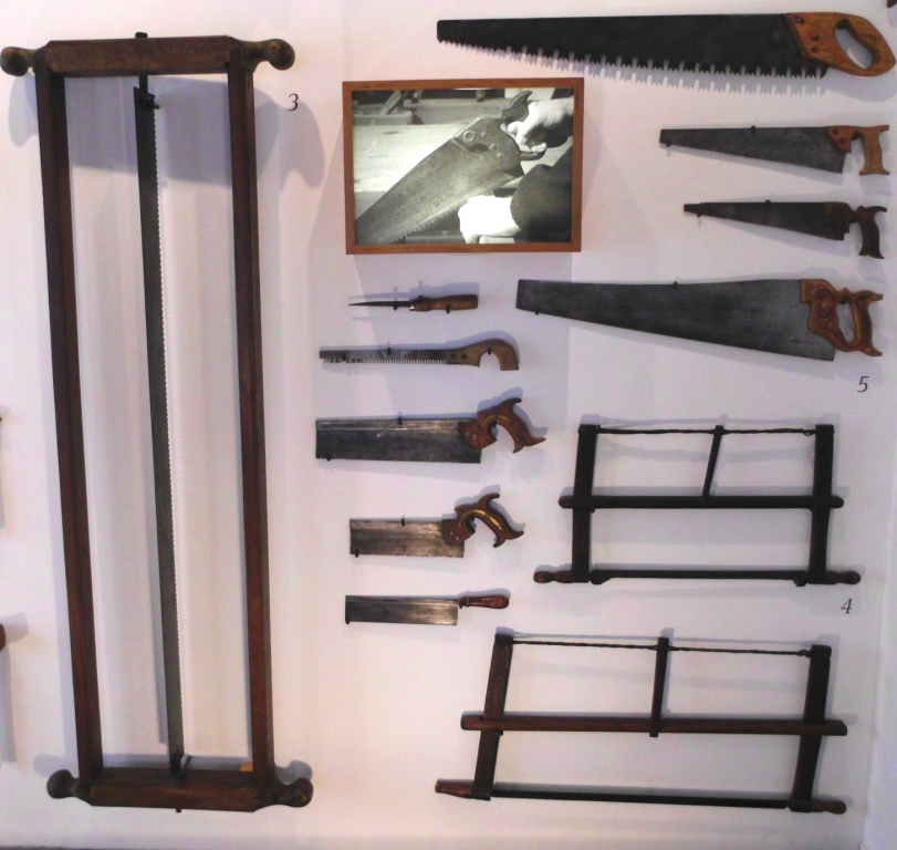 Werkzeuge für Bootsbauer, Haus Elsfleth